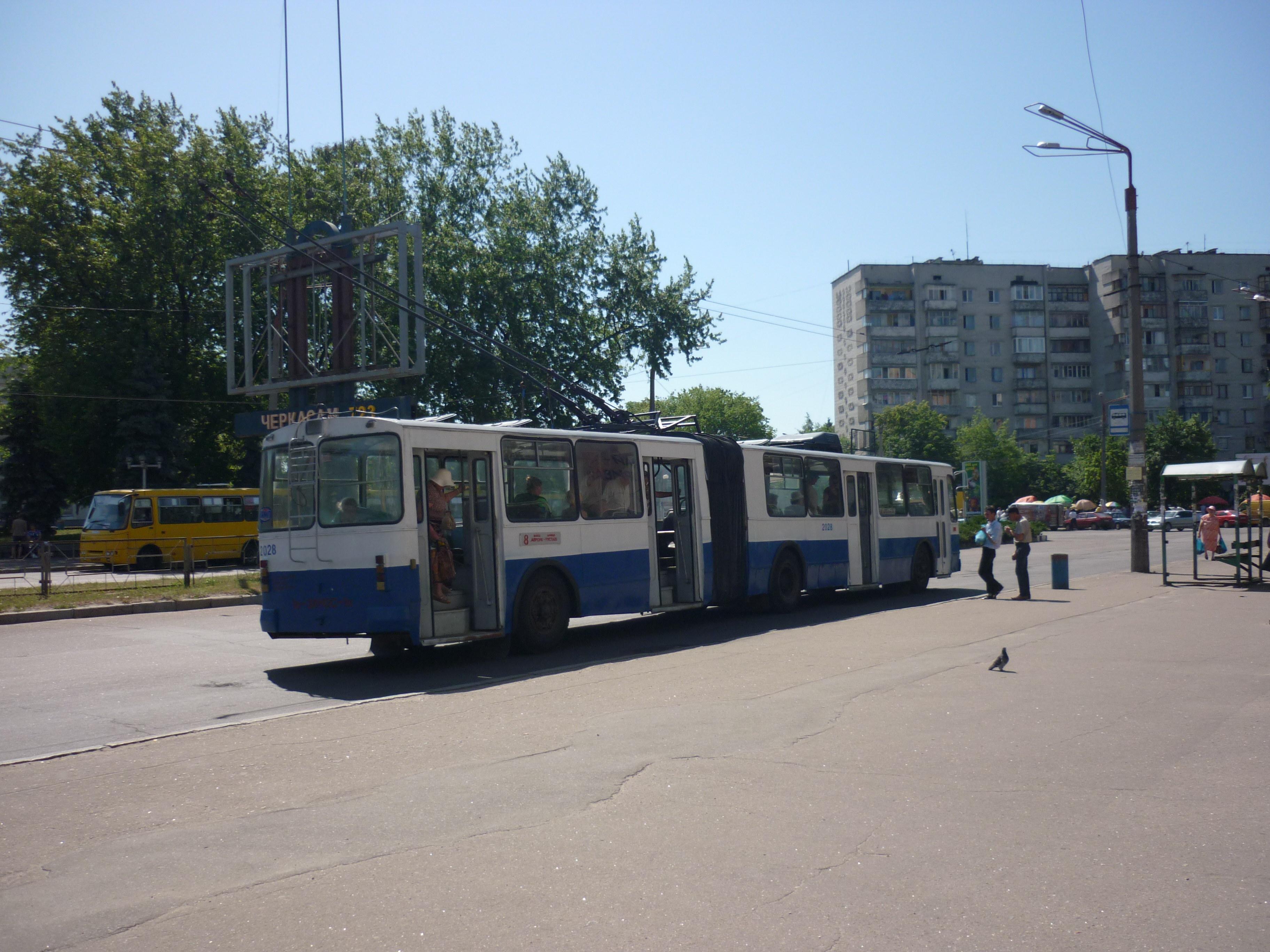 Тролейбус на площі 700-річчя Черкас